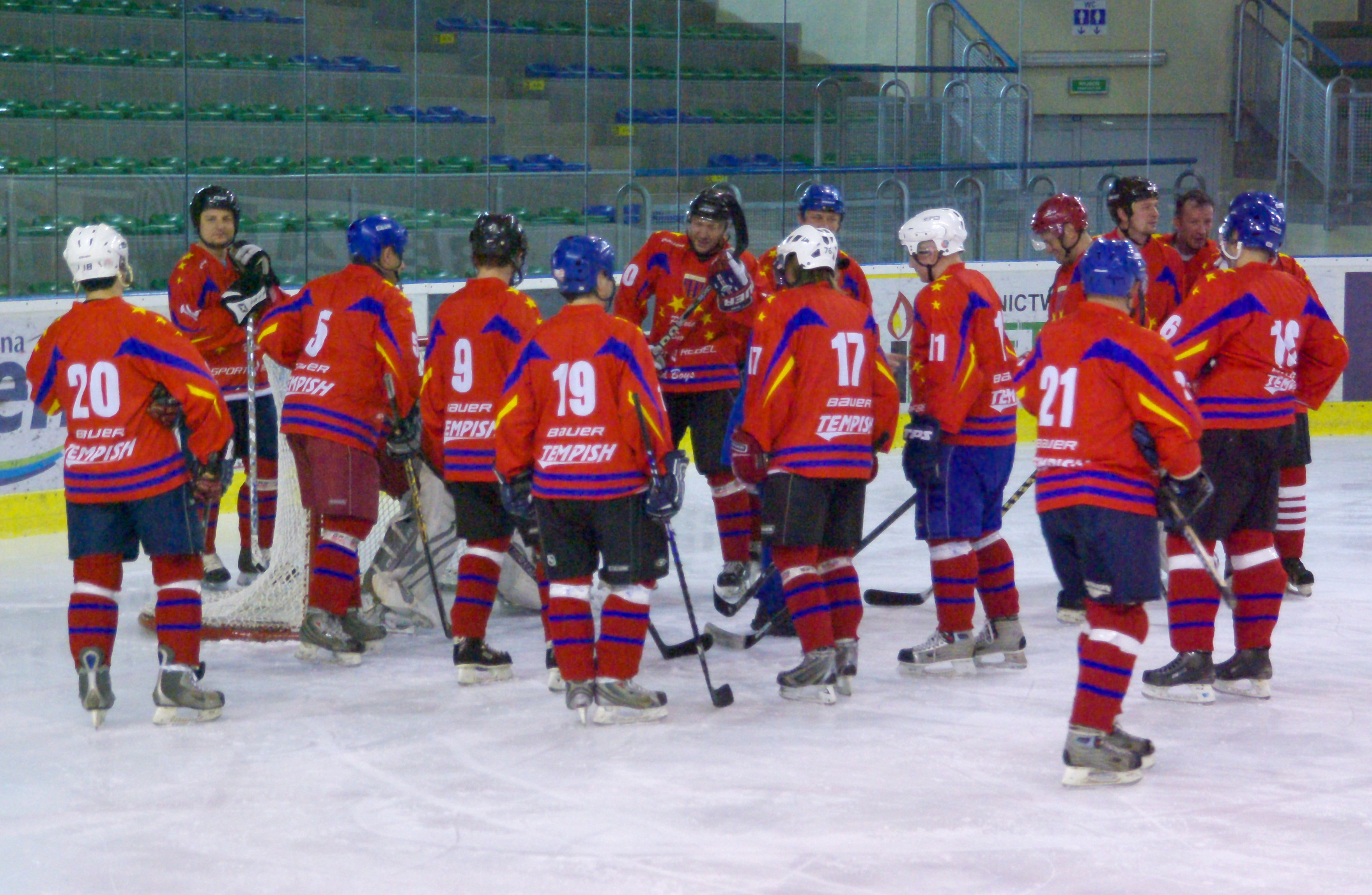 Drużyna Polonii Bytom podczas Mistrzostw Polski Oldboyów w Sanoku 2012